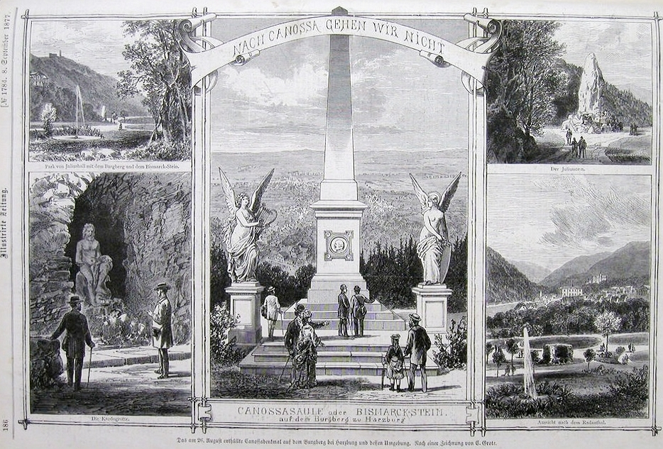 Bad Harzburg, Canossasäule, Zeichnung